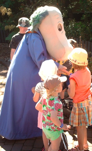 Koduvana